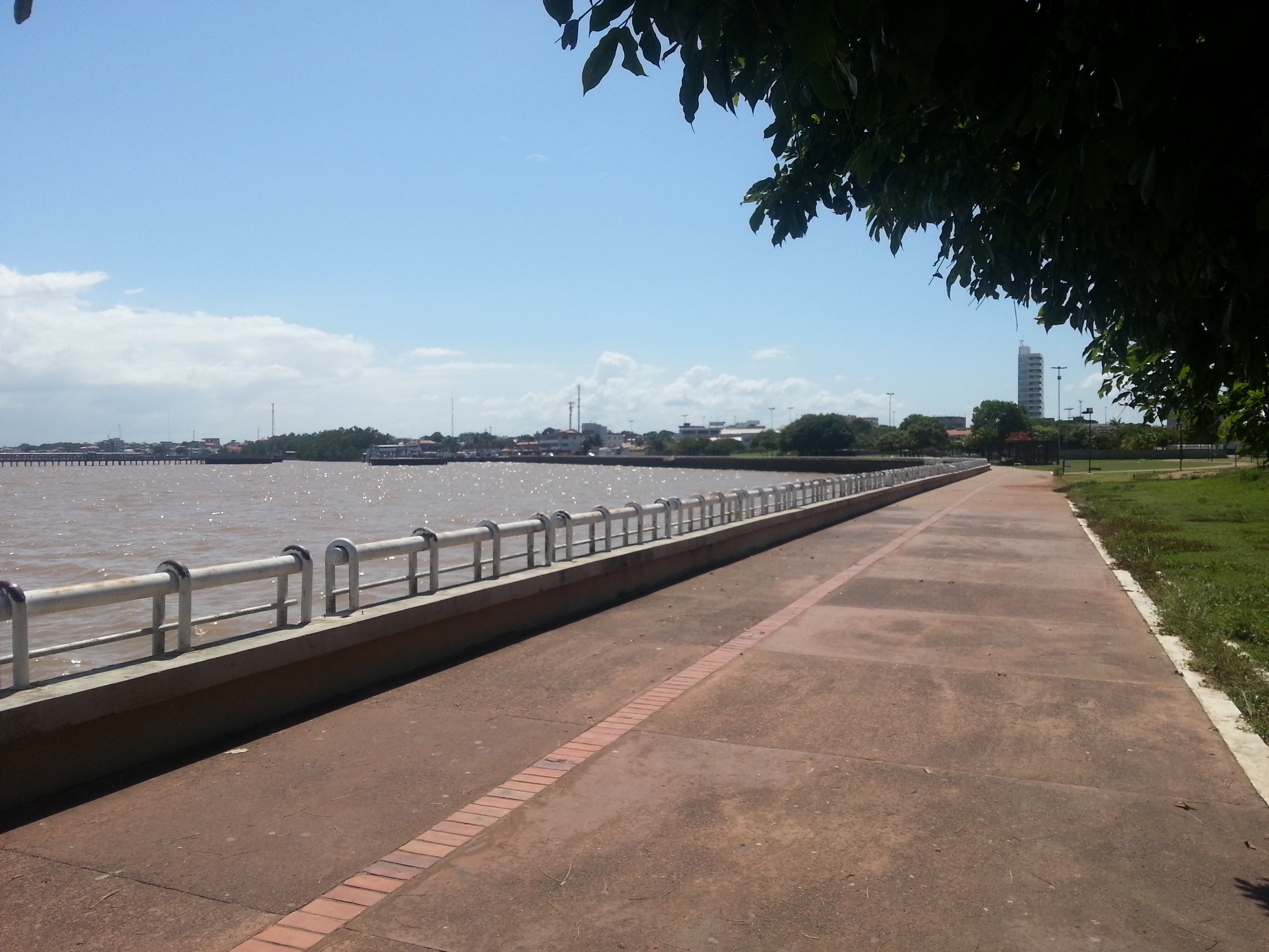 Av. Coaraci Nunes, 1574-1608 - Central, Macapá - AP, Brazil